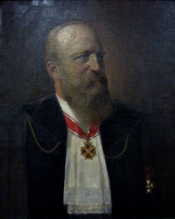 Portrait Hugo von Meyer (1837-1902). Bezeichnung: „R. Thost“ (Sign. o.r.) „Hugo Meyer / Fac. jur. / nat. 1837 pict 1903“. Öl auf Leinwand. 71,2 cm x 57,3 cm. Inventar-Nr. 97/166